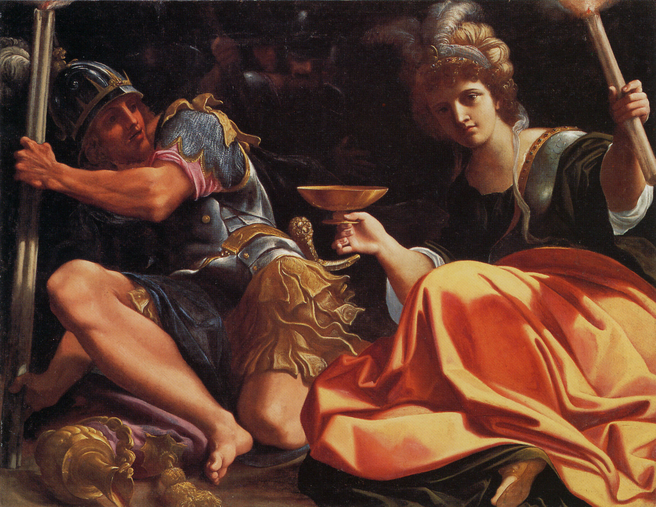 Alessandro e Taidelabel QS:Lit,"Alessandro e Taide"